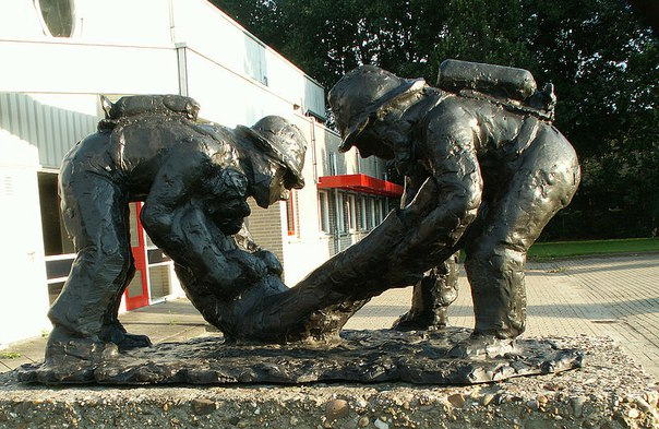 Памятник методу Раутека в Нидерландах, город Лёсден.